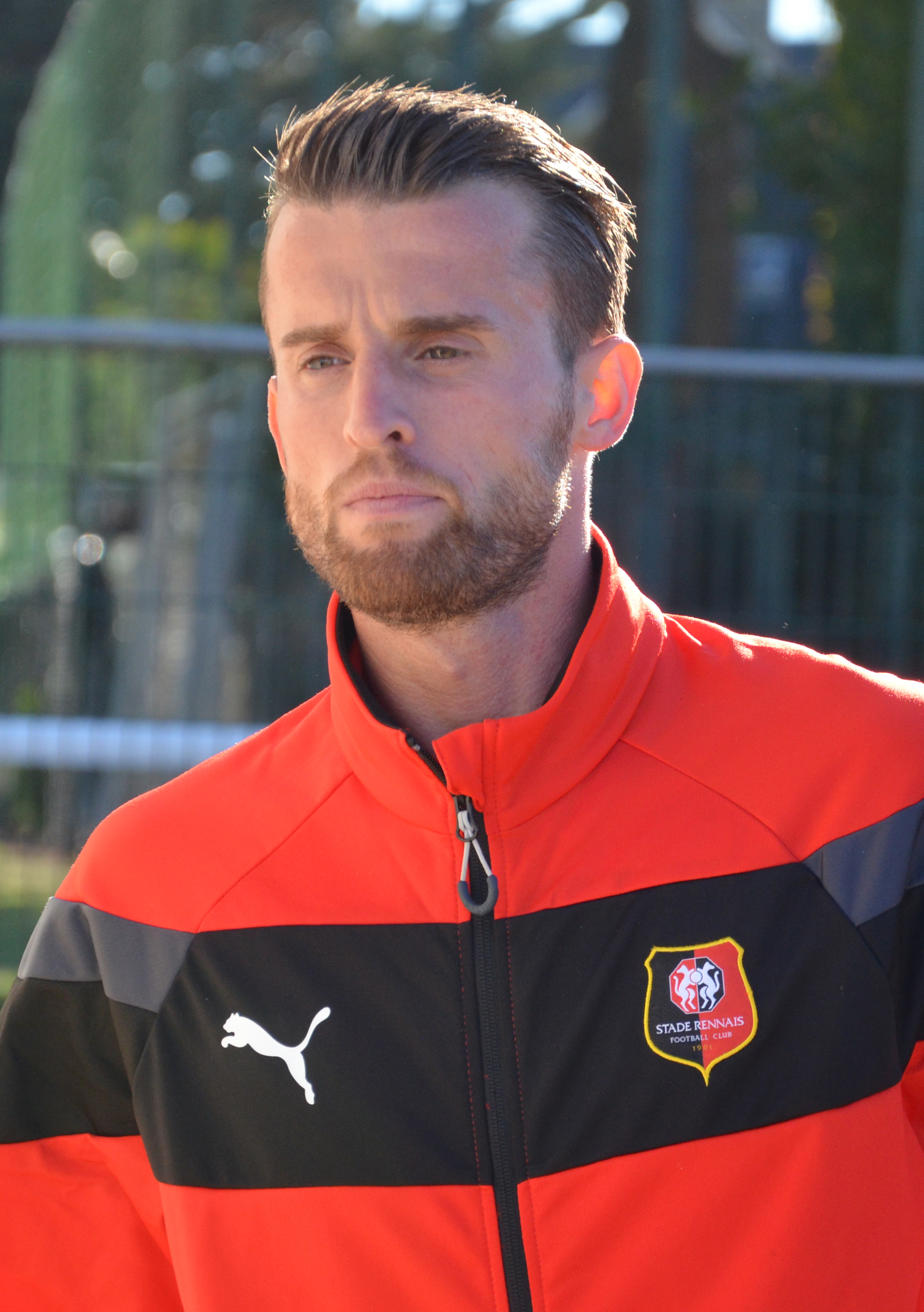 Photographie prise lors du match opposant le Stade rennais à l'USM Alger en match amical au stade Paul-Audrin de Dinard le 16 juillet 2016. Ici, Ermir Lenjani.